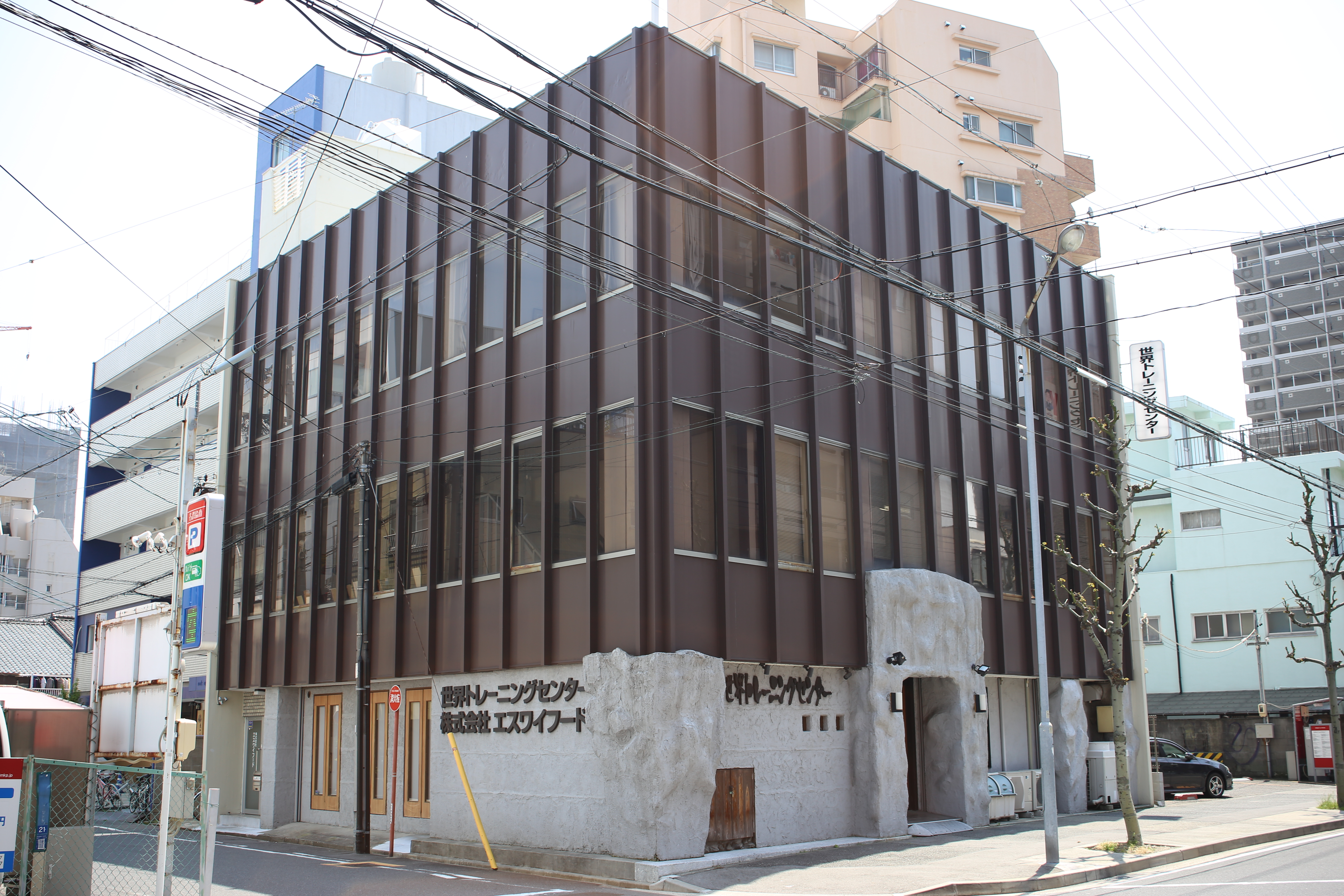 名古屋市中区新栄一丁目のエスワイフード本社を西側公道北側より撮影。居酒屋チェーン「世界の山ちゃん」運営で知られる。